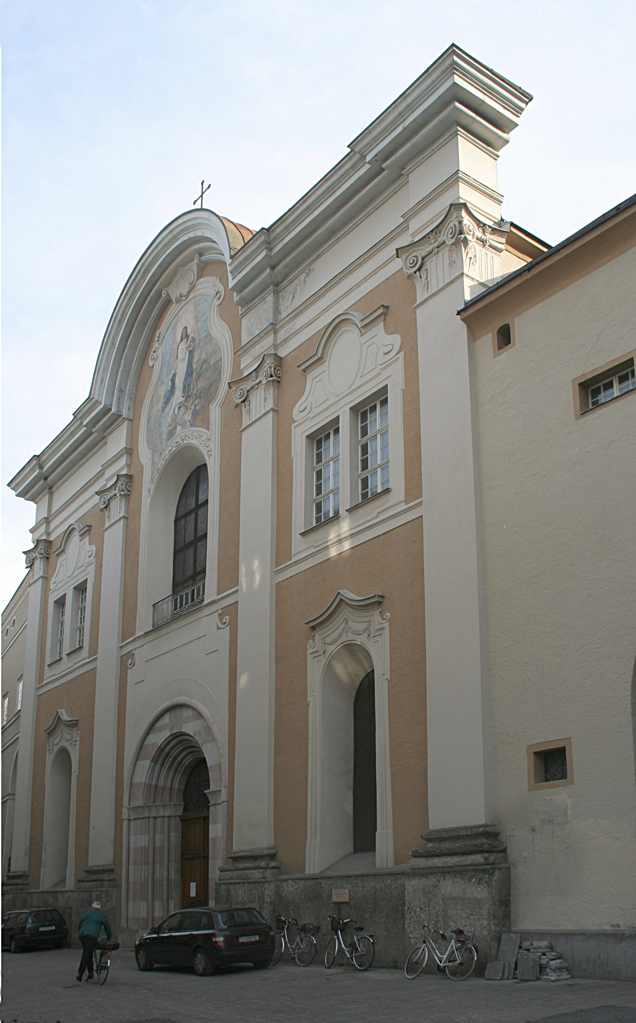 Salzburg. Franziskanerkirche frontview